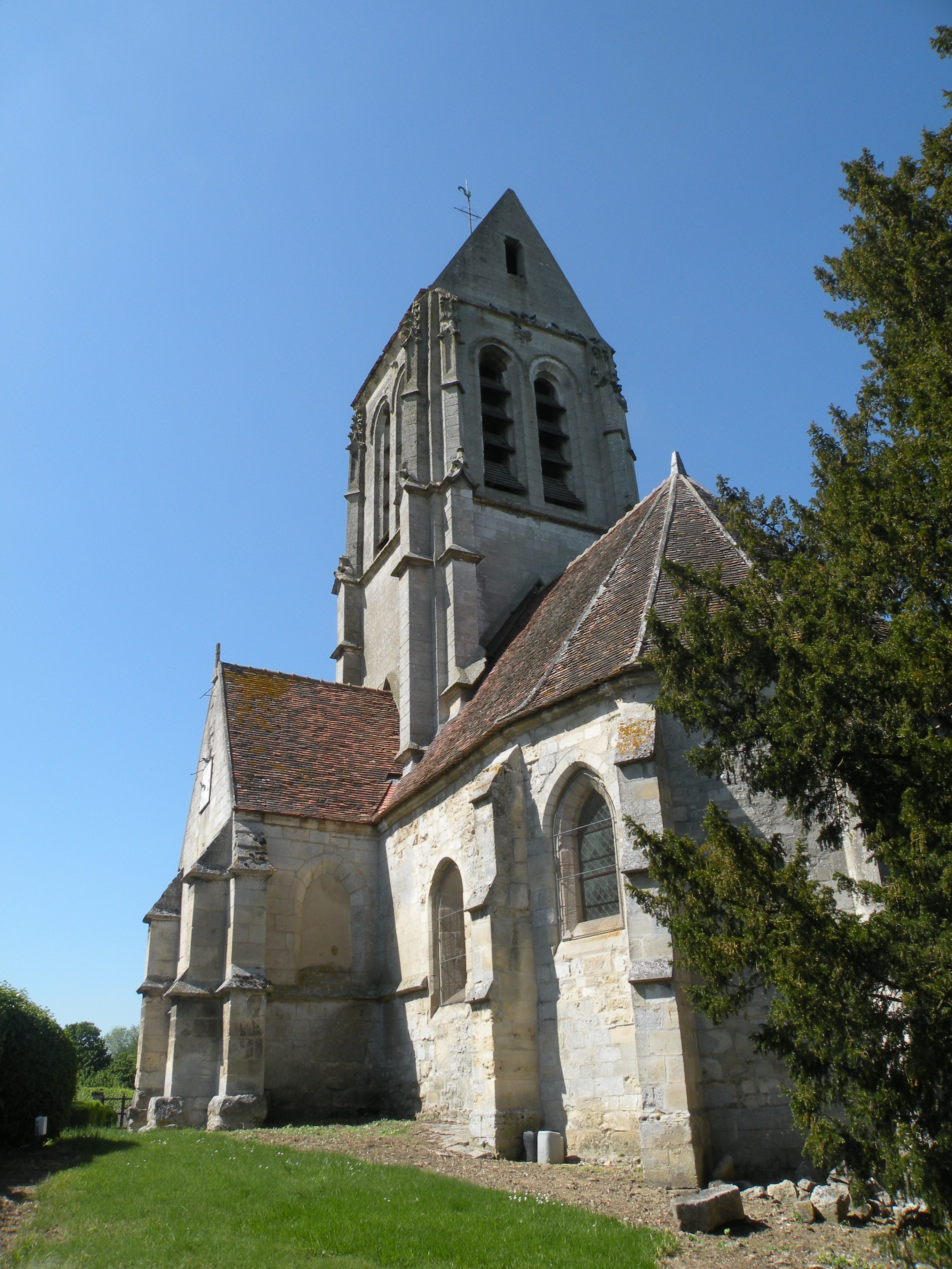 Église Saint-Denis de Berville